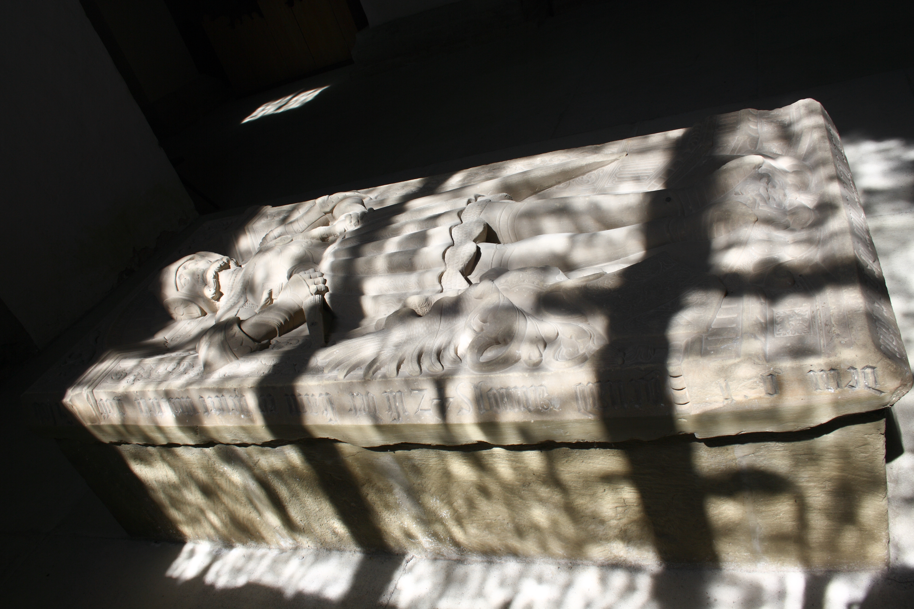 Evangelische Pfarrkirche, ehemalige Benediktinerklosterkirche St. Maria in Auhausen im Landkreis Donau-Ries (Bayern), romanische Tumba mit Epitaph von 1542 für Hartmann von Lobdeburg († 958), den angeblichen Stifter der Abtei Auhausen